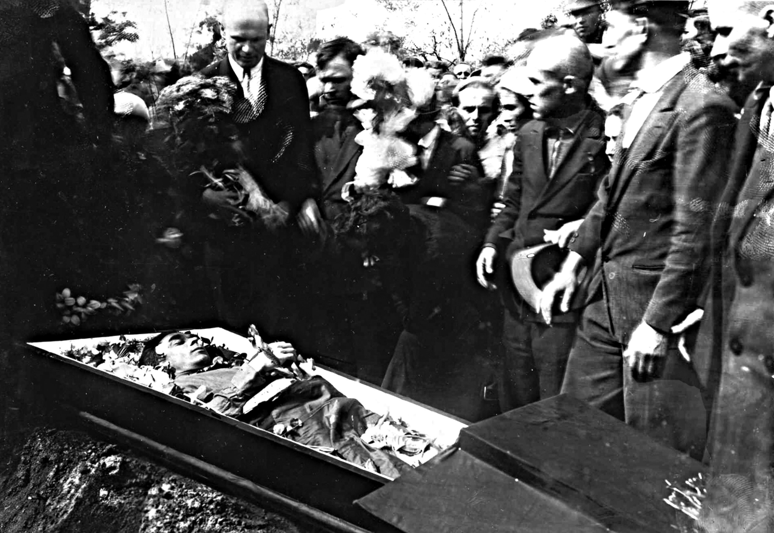 Похорони Миколи Хвильового